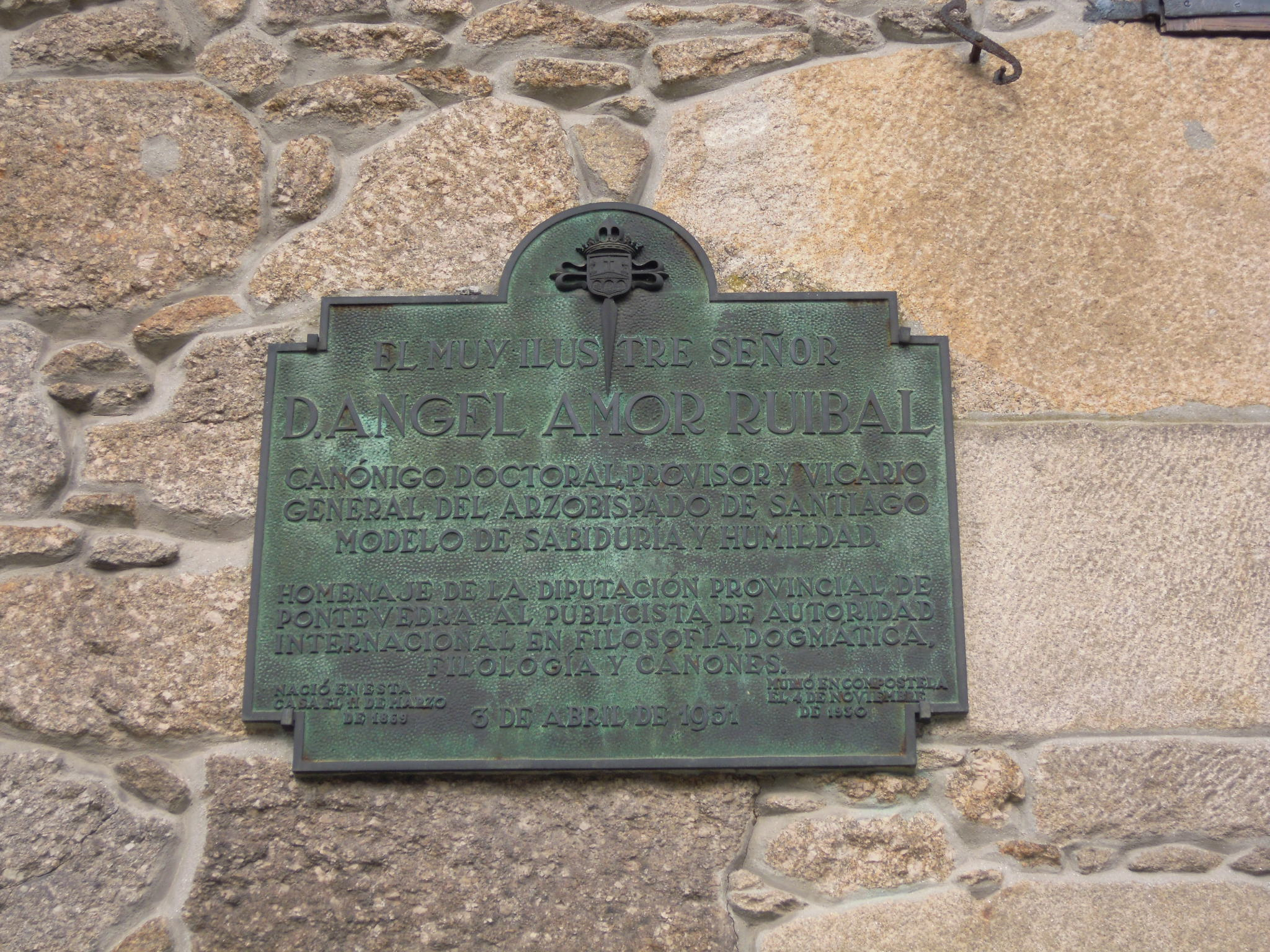 Placa na casa natal de Ángel Amor Ruibal en Cangrallo (Barro), co seguinte texto:El muy ilustre señorD. Ángel Amor Ruibalcanónigo doctoral, provisor y vicariogeneral del arzobispado de Santiagomodelo de sabiduría y humildad.Homenaje de la Diputación Provincial dePontevedra al publicista de autoridadinternacional en filosofía, dogmática,filología y cánones.Nació en esta casa el 11 de marzo de 1859.Murió en Compostela el 4 de noviembre de 1950.3 de abril de 1951.